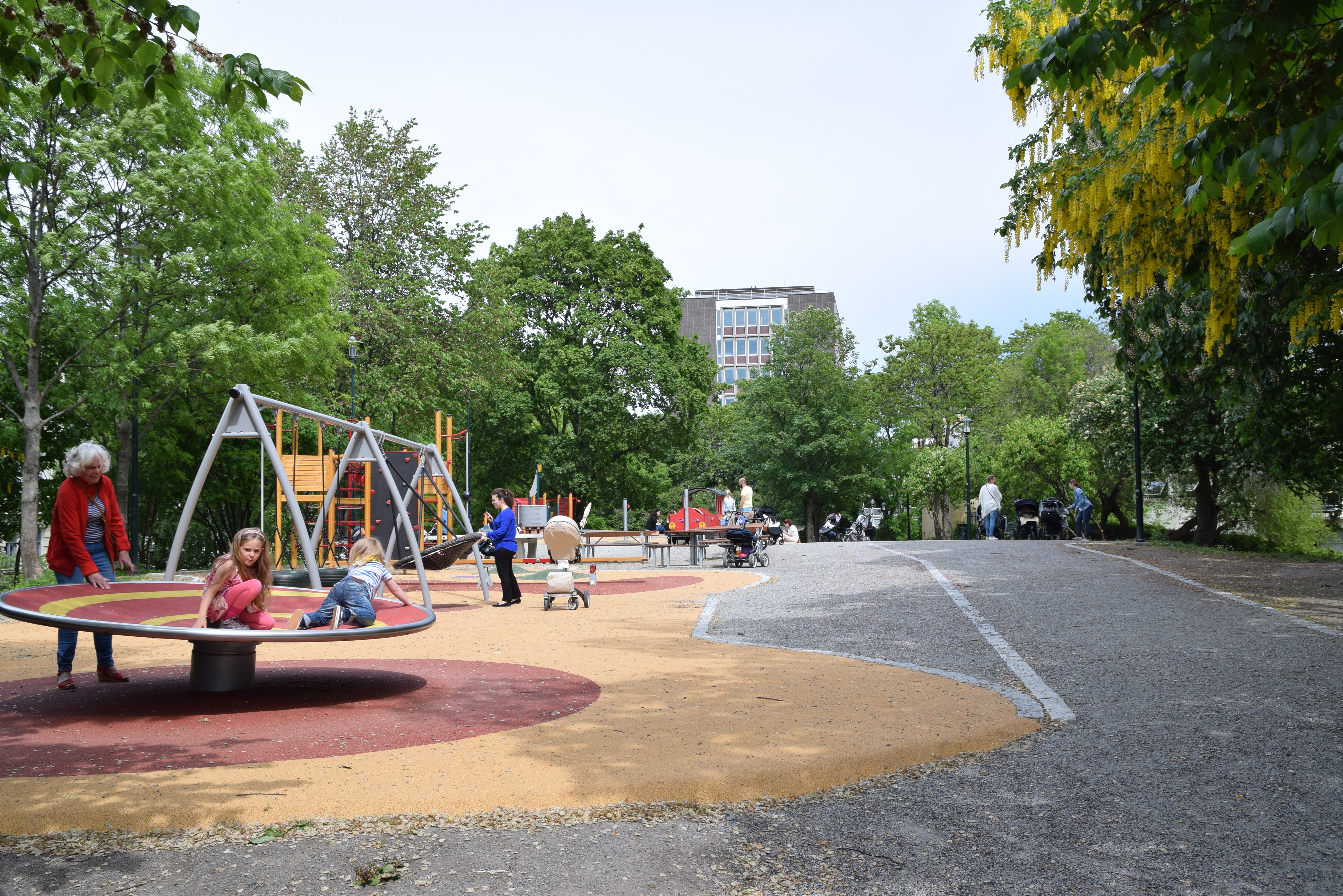 Framneshaven / Tinker'n, Skillebekk, Oslo, sett mot nord med Drammensveien 60 i bakgrunnen, juni 2015